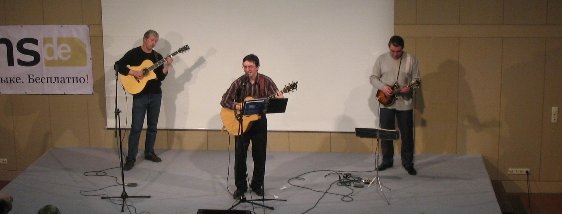 Тимур Шаов (Timur Shaov) на концерте в Аугсбурге (In Augsburg)